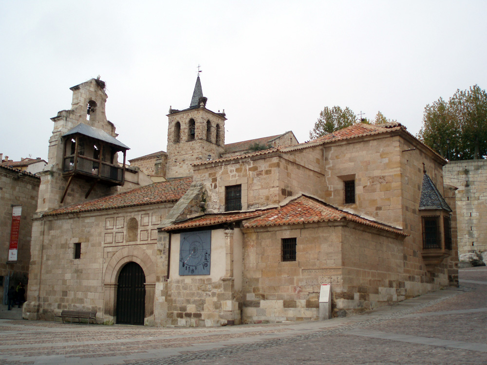 Iglesia de Santa Lucía en Zamora, España.